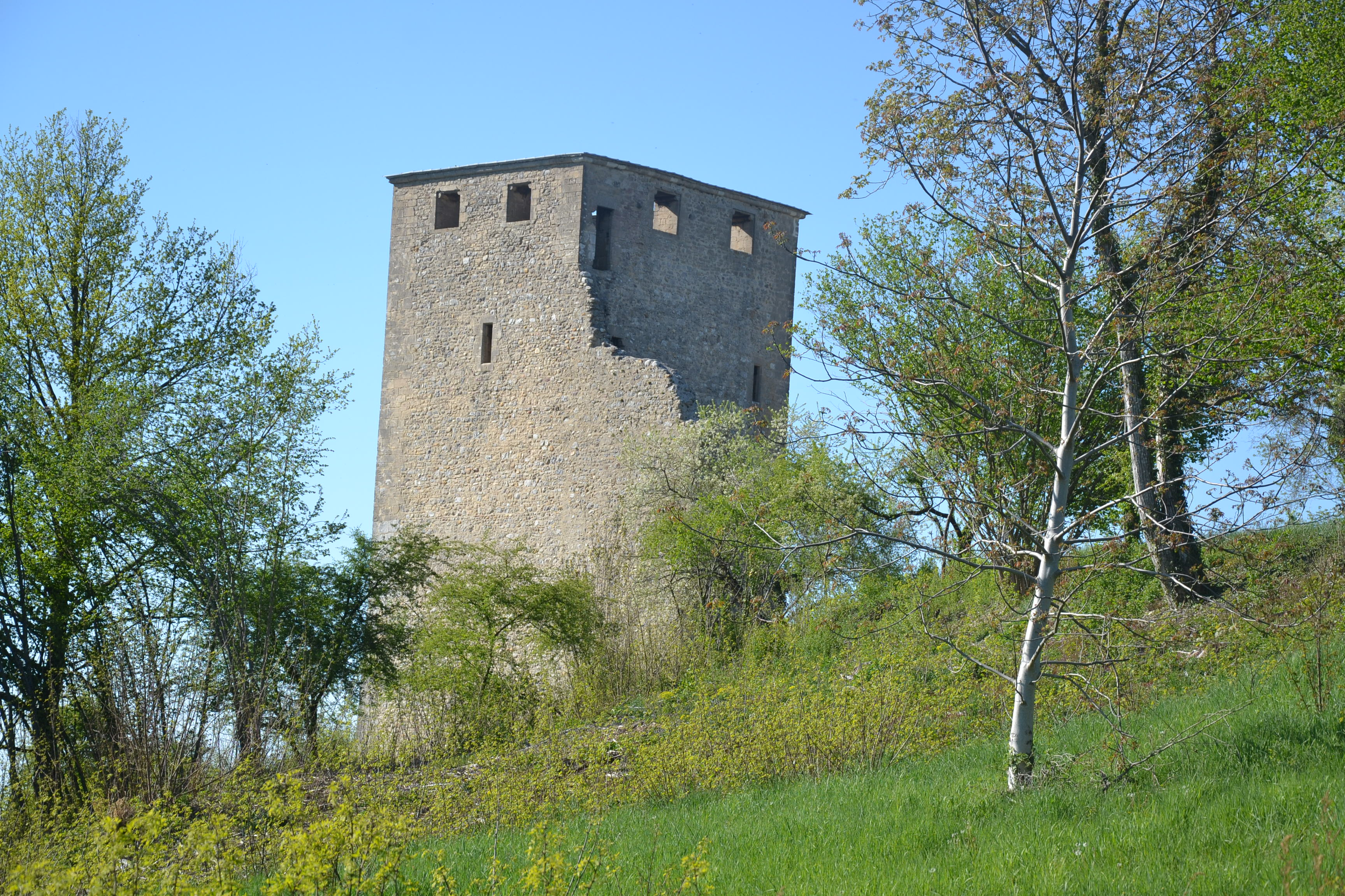 Tour du château de Saint-Denis-en-Bugey (Ain, France).